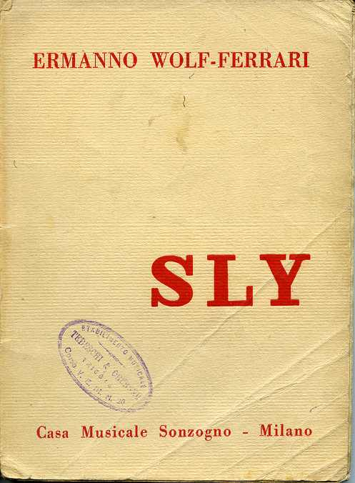 Copertina del libretto del 1928 dell'opera lirica "Sly" di Ermanno Wolf-Ferrari.